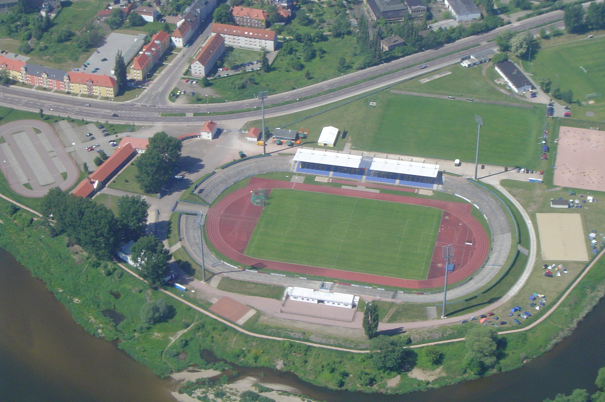 Luftbild Dessau: Paul-Greifzu-Stadion an der Mulde